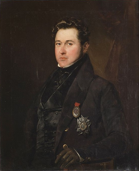 Retrato del aristócrata y político español Manuel de la Pezuela y Ceballos (1797-1872), segundo marqués de Viluma y ministro de Estado durante el reinado de Isabel II de España, aunque también fue embajador de España en Londres, gobernador de Santander y presidente del Senado.